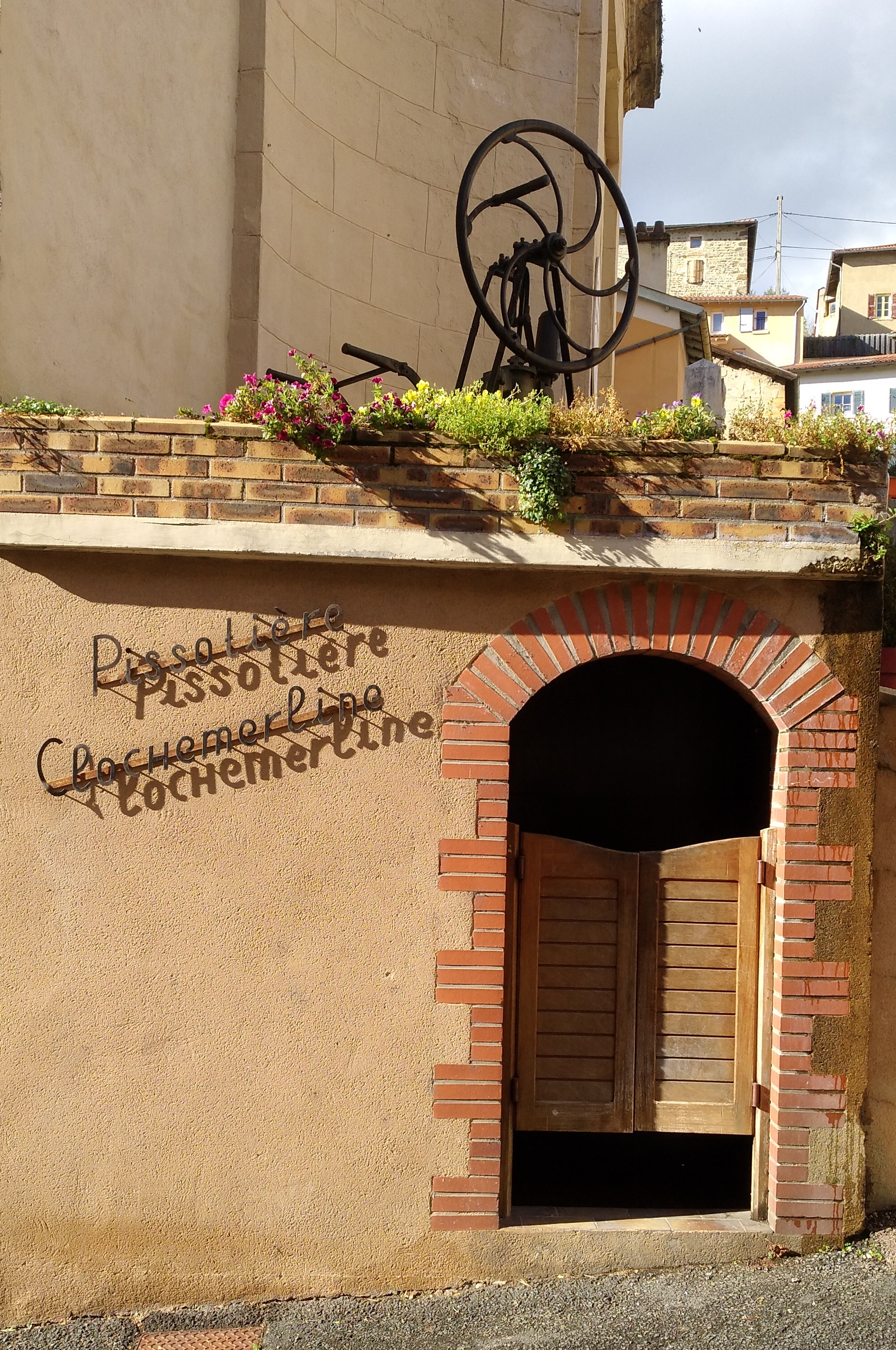 Pissotière de Clochemerle, à Vaux-en-Beaujolais (Rhône, France).